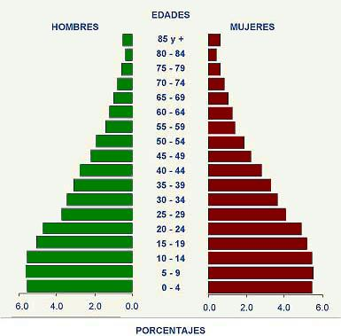 Pirámide de edades de la población del Ecuador segun datos del Censo del 2001